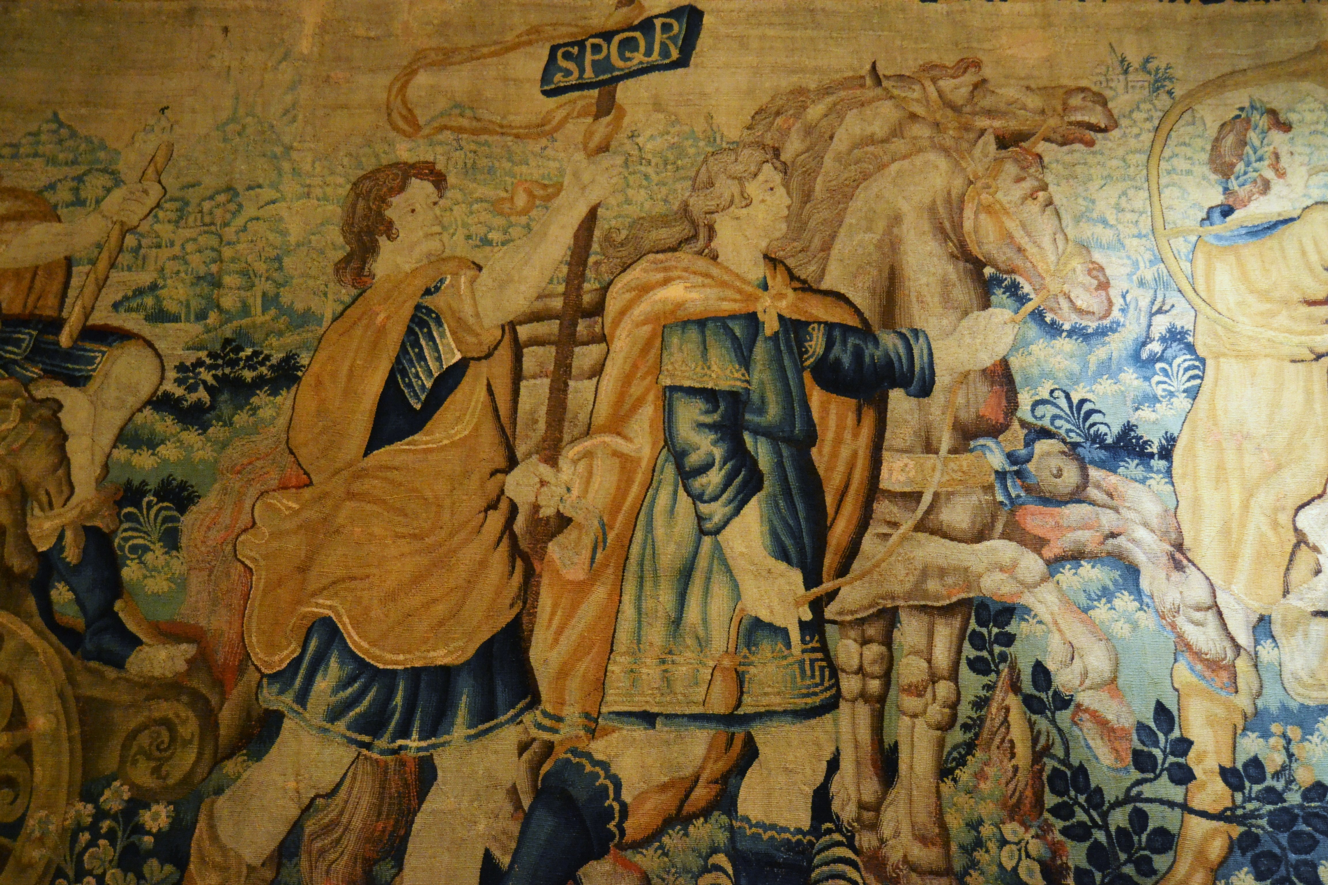 Tapís flamenc amb escena de triomf romà (detall), fumoir del Palau del Marqués de Dosaigües. Llana i seda, segle XVI.